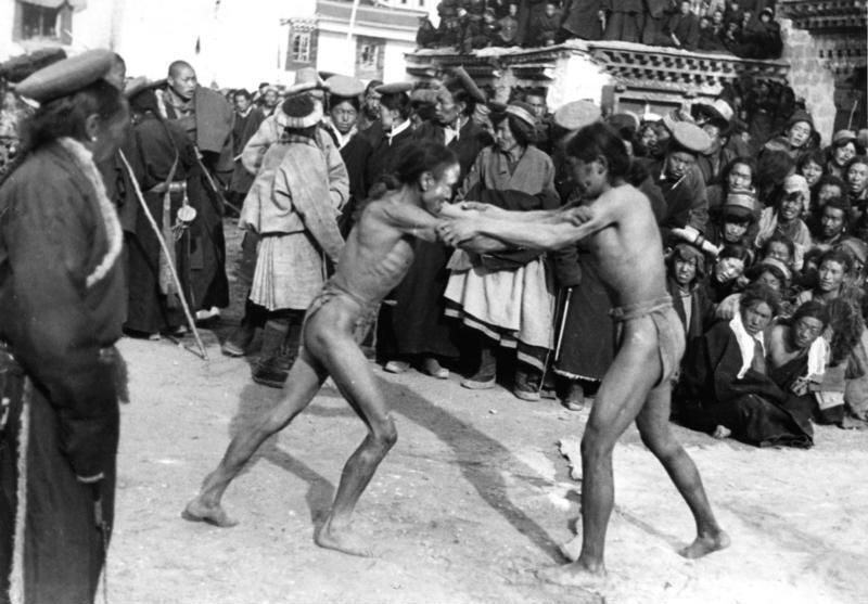 Lhasa, Neujahrsfest